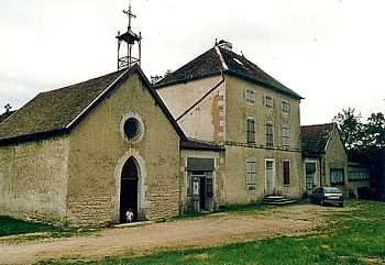 Chapelle de Bermont, Vosges (© Francis MONTIGNON) GFDL Francis MONTIGNON Catégorie:Image de commune des Vosges